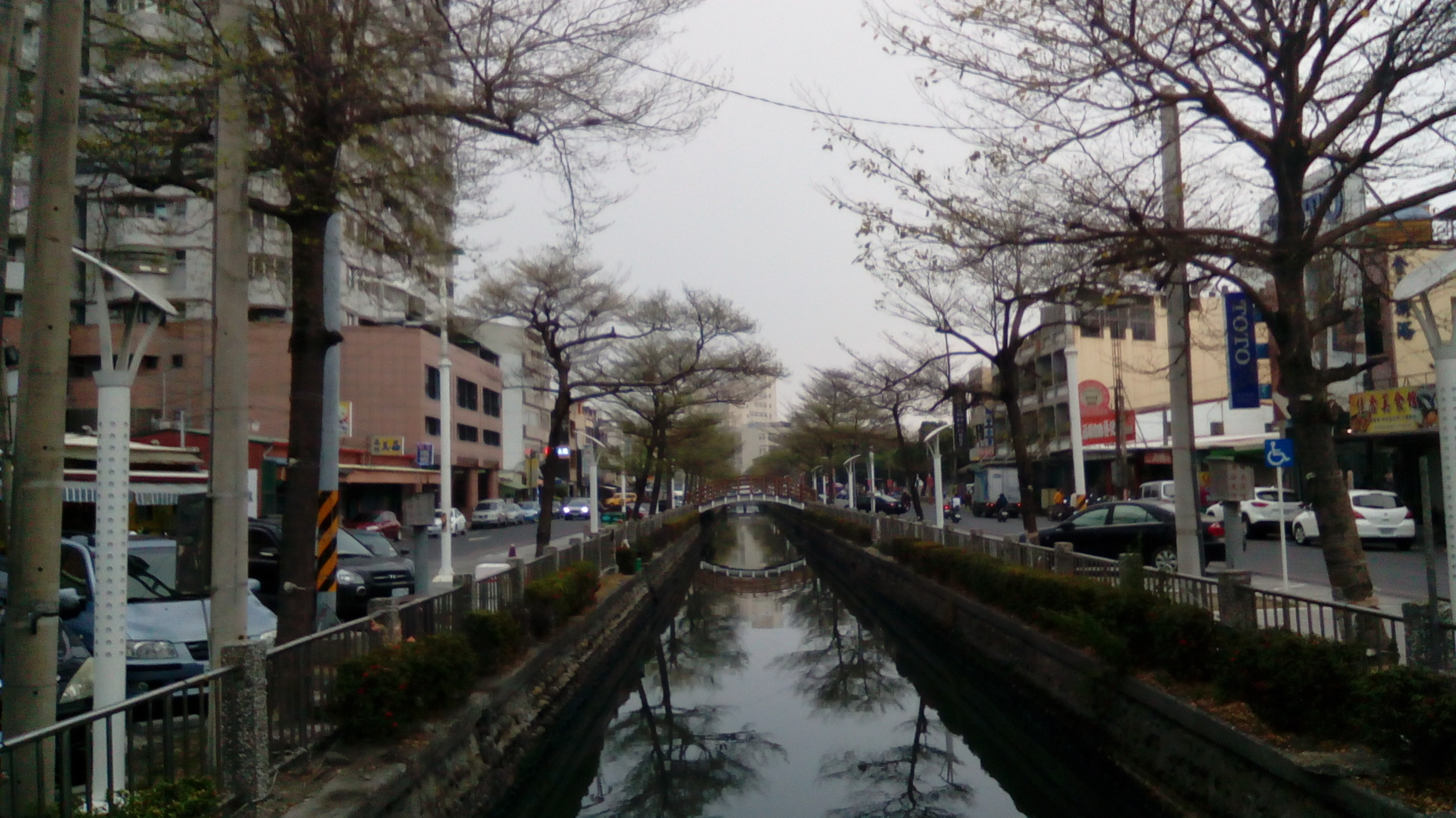 攝於中正路及光復後三段口